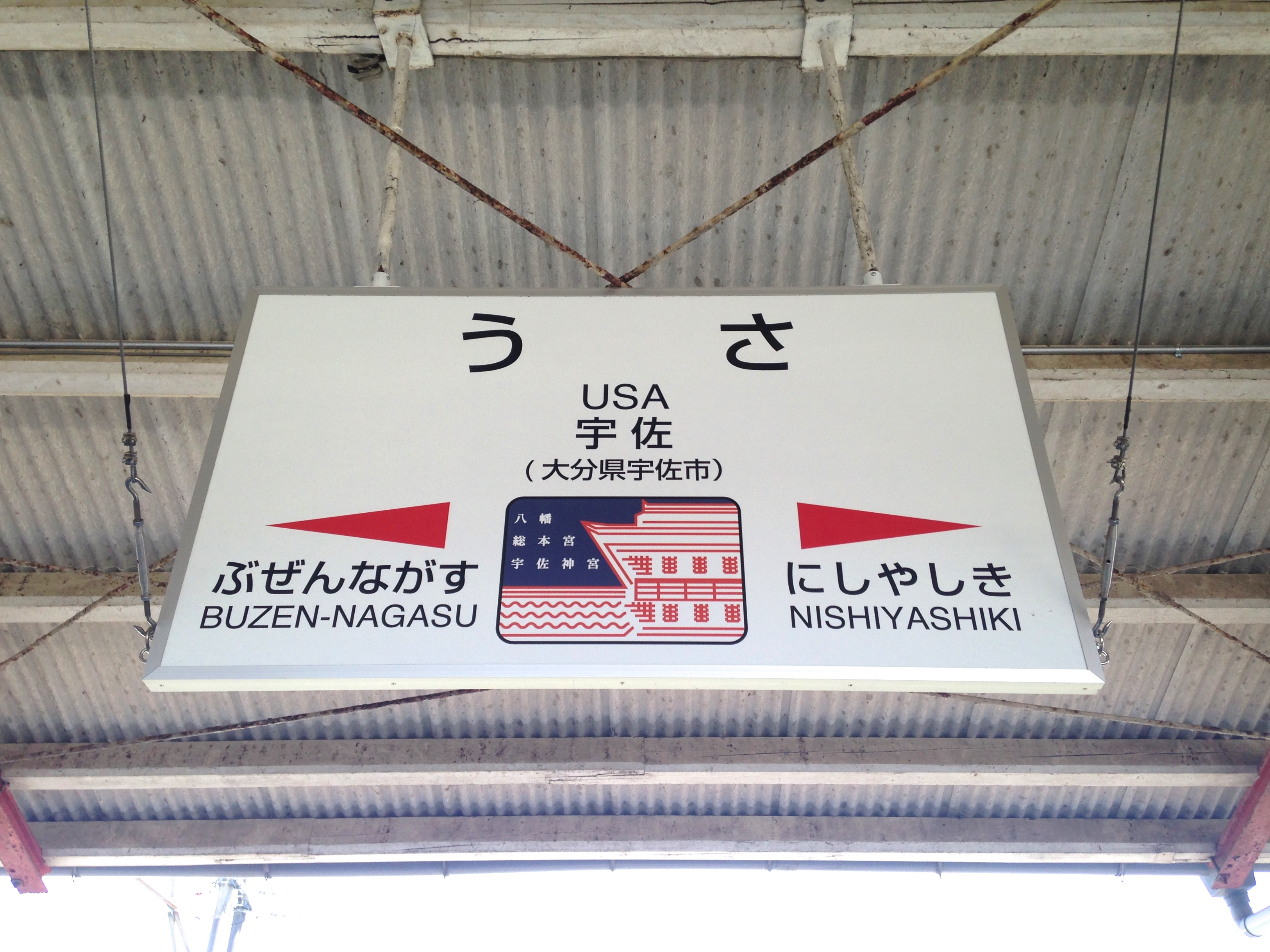 宇佐駅の駅名標。イラストは八幡総本宮・宇佐神宮の南中楼門